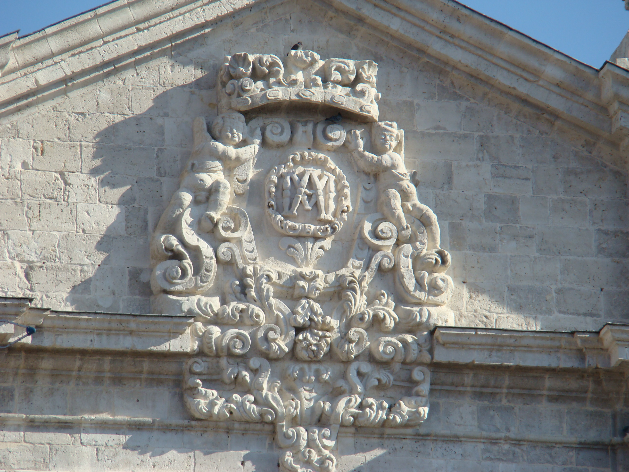 Escudo sostenido por dos ángeles con las iniciales de María, obra del escultor salmantino Juan García Espinosa. Tercer cuerpo del imafronte de la catedral de Valladolid (España), con trazas de Alberto de Churriguera.